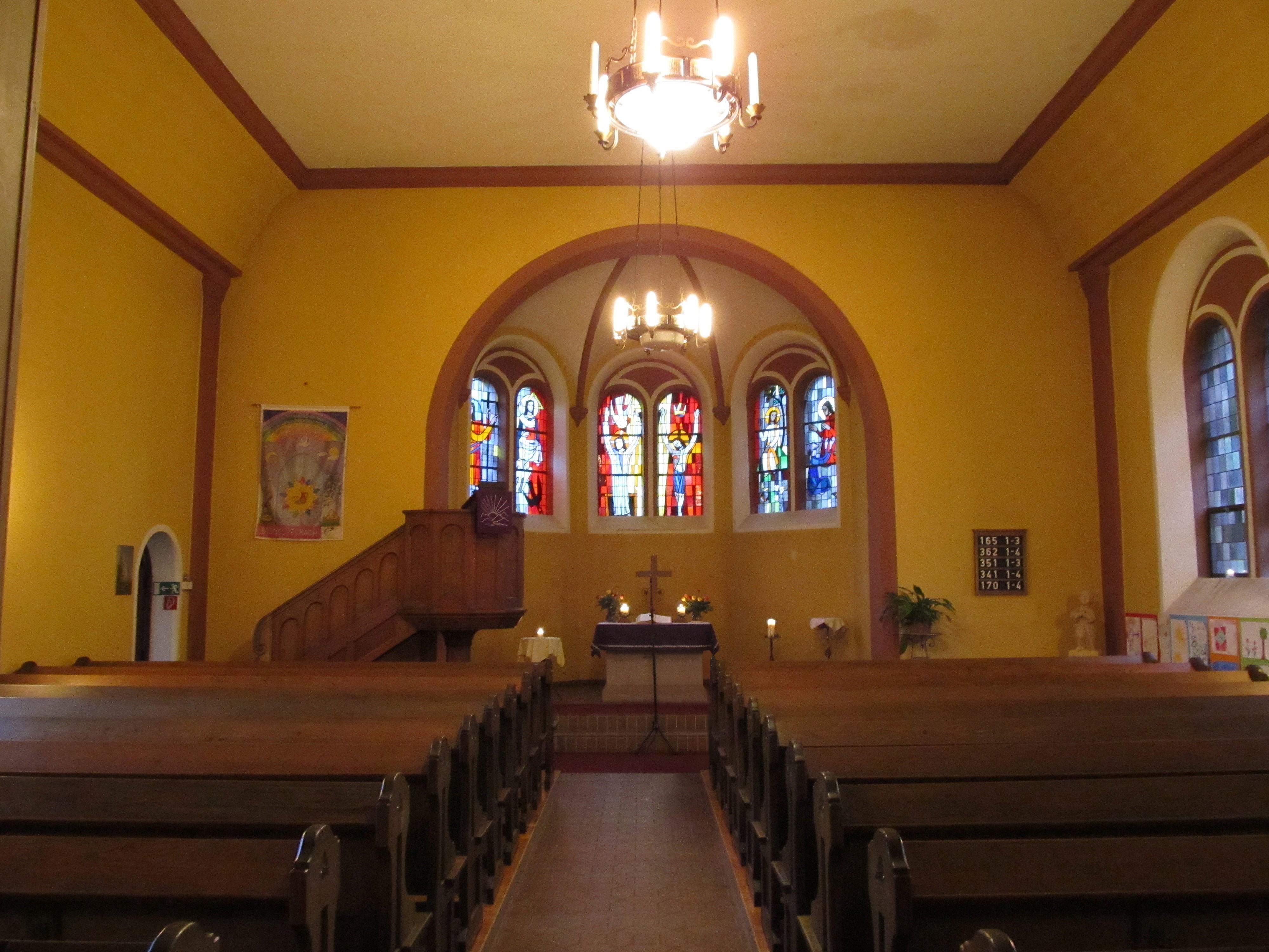 Blick ins Innere der protestantischen Kirche in Brenschelbach, Saarland